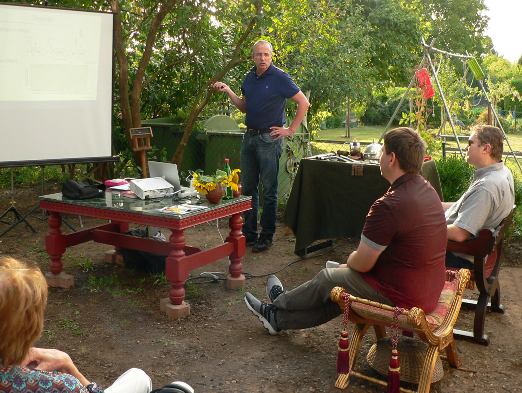 Disputation einer Bachelorarbeit an der Leibniz Universität Hannover zur chemische Analyse von Metallfunden aus dem Römerlager auf dem Gelände des Informationscenters der Römer AG Leine (RAGL) am Rande des Marschlagers in einem Kleingartengelände mit dem Kandidaten und den Prüfern auf den (römischen) Stühlen, links der Archäometallurg und Chemiker Robert Lehmann und rechts der Chemiker Franz Renz von der LUH